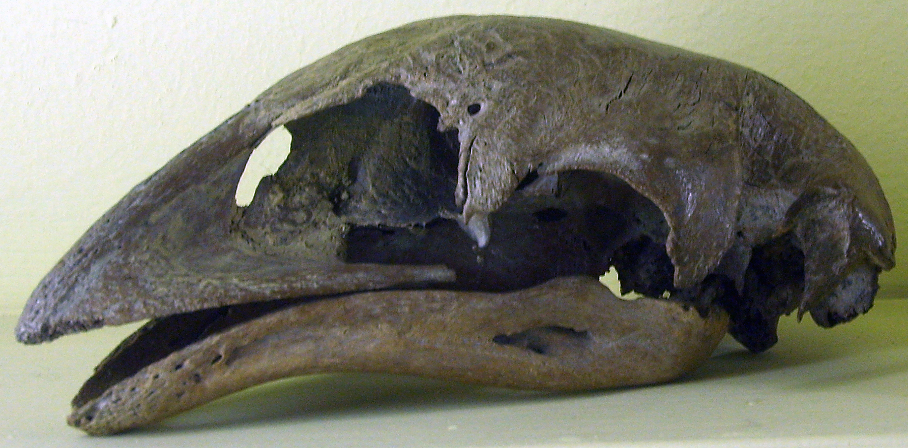 Dinornis novaezealandiae skull at the Museum für Naturkunde, Berlin.